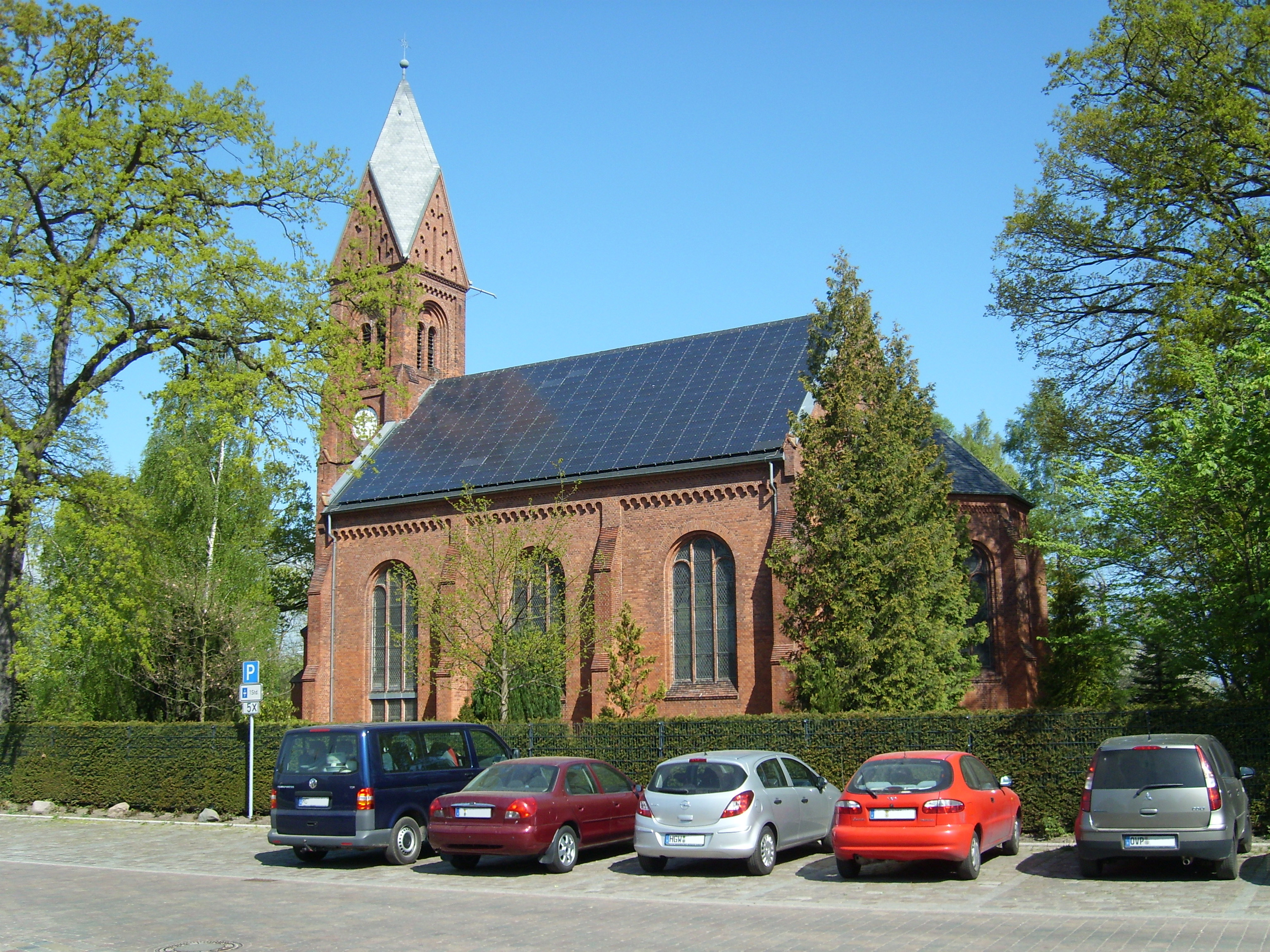 Dorfkirche im Greifswalder Ortsteil Wieck